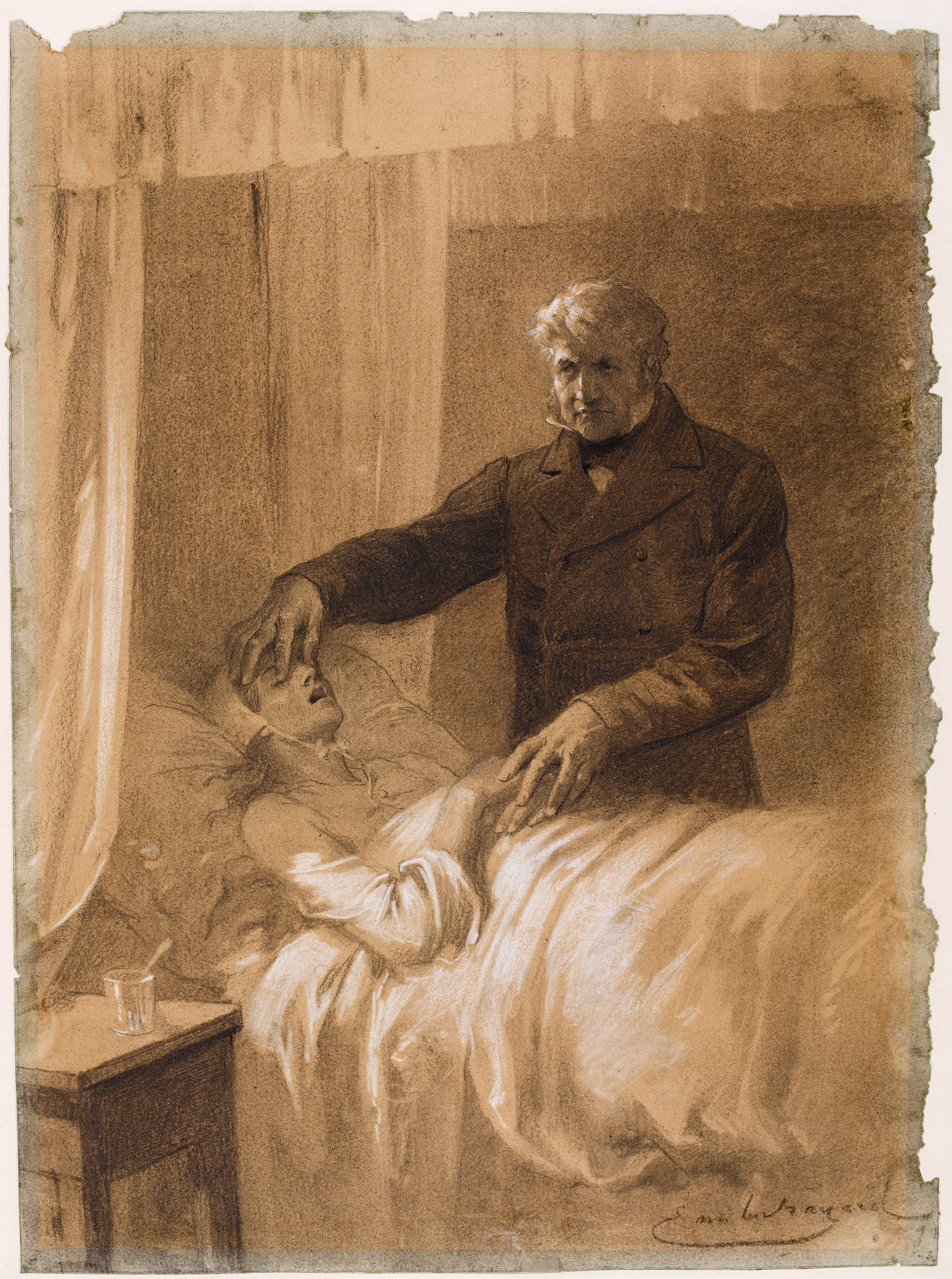 Il lui ferma les yeux, illustration d'Émile Bayard pour l'édition Eugène Hugues du roman de Victor Hugo, Les Misérables, 1ère partie, "Fantine", livre 8e, "Contre-coup", chapitre 4, "L'autorité reprend ses droits".